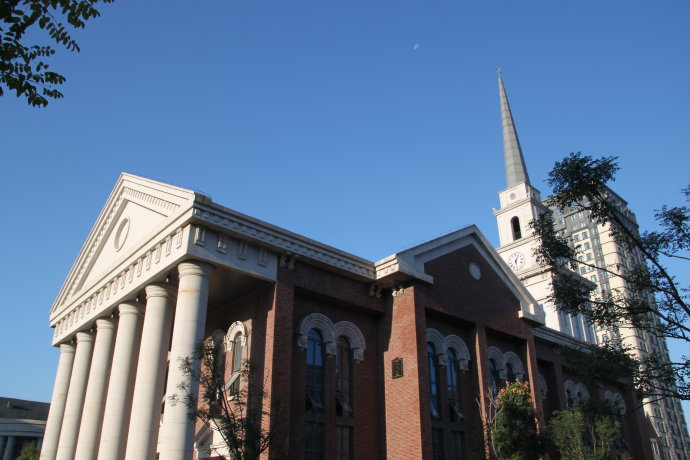 中文（中国大陆）: 天津滨海昆西园教堂